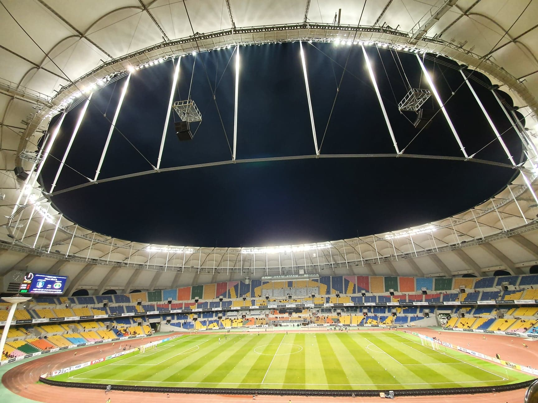 부산아시아드주경기장의 모습. 2019년 EAFF E-1 풋볼 챔피언십 대한민국 - 중국전 때 촬영함.